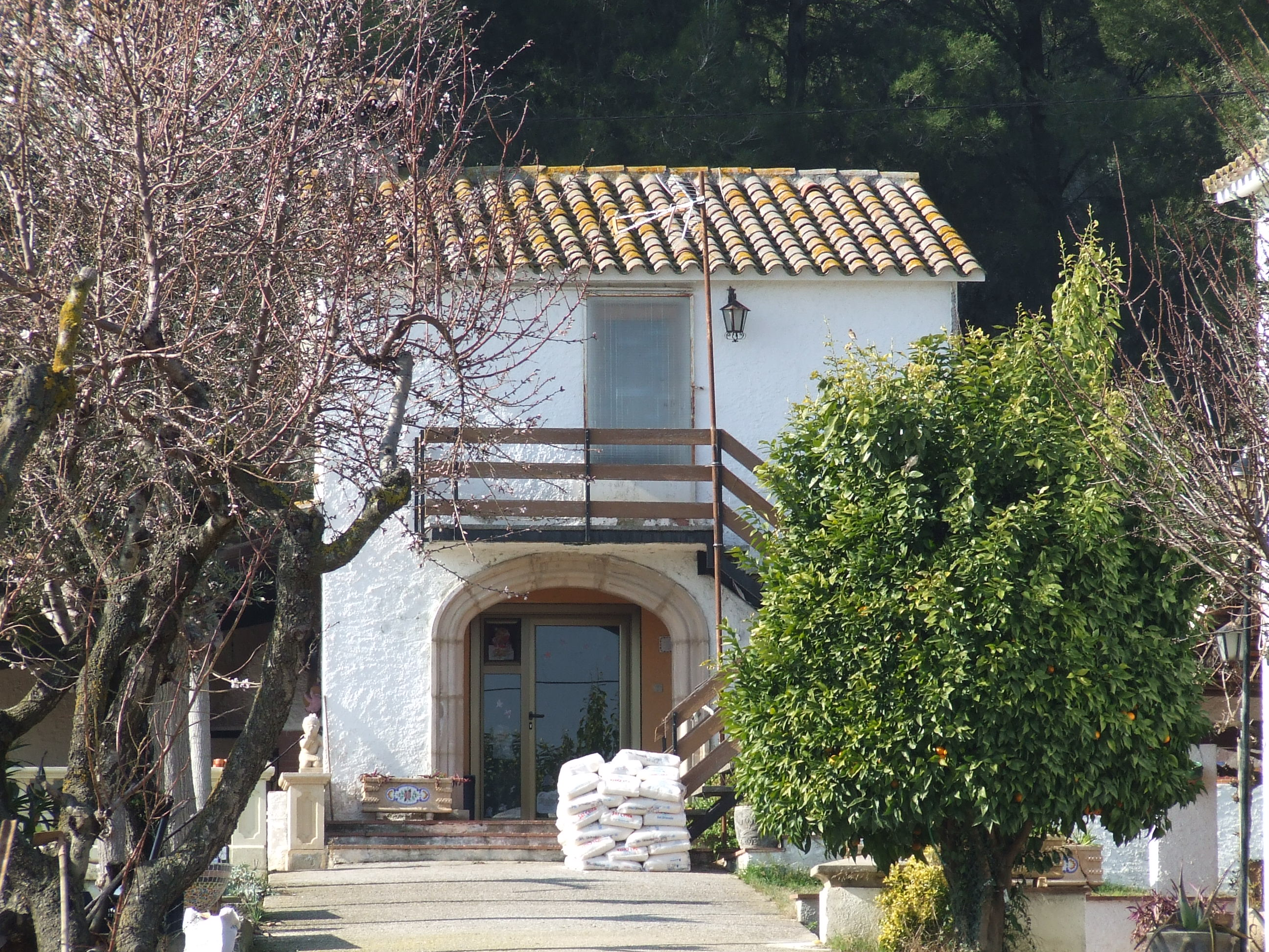 Can Bacardí (Bigues, Bigues i Riells, Vallès Oriental).